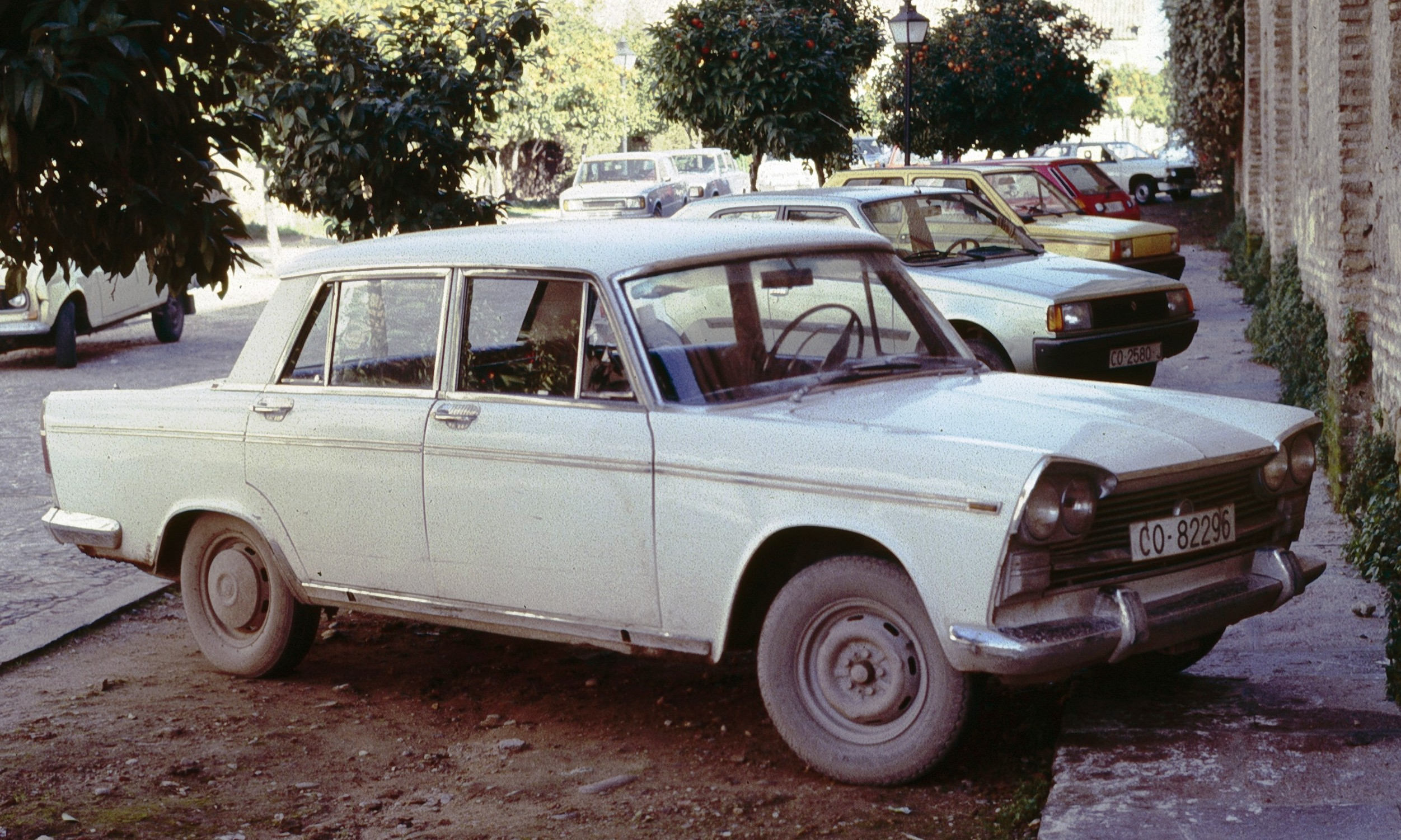 SEAT 1500 del 1970, su base FIAT 1500 L